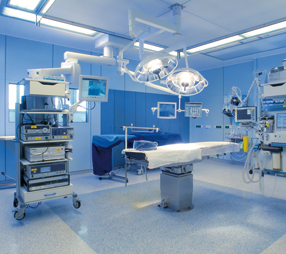 Operationssaal in einer Klinik, mit sterilAir Technologien keimfrei.